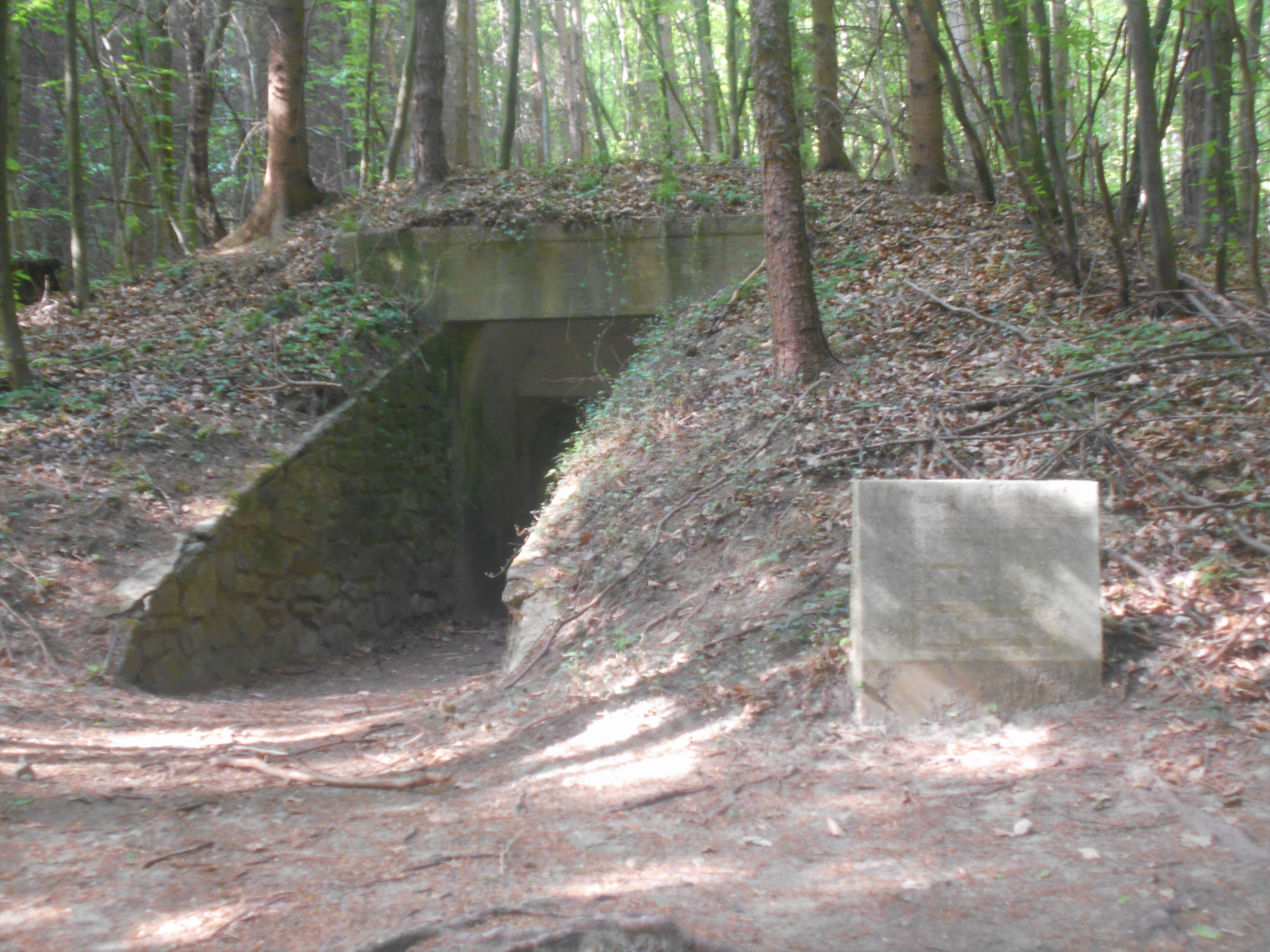 Hügelgrab Bei den Drei Wassern, "Römergrab", norisch-pannonisches Hügelgrab aus römischer Zeit, an der Gemeindegrenze von Sieghartskirchen (KG Kronstein) zu Pressbaum (KG Au am Kraking) gelegen